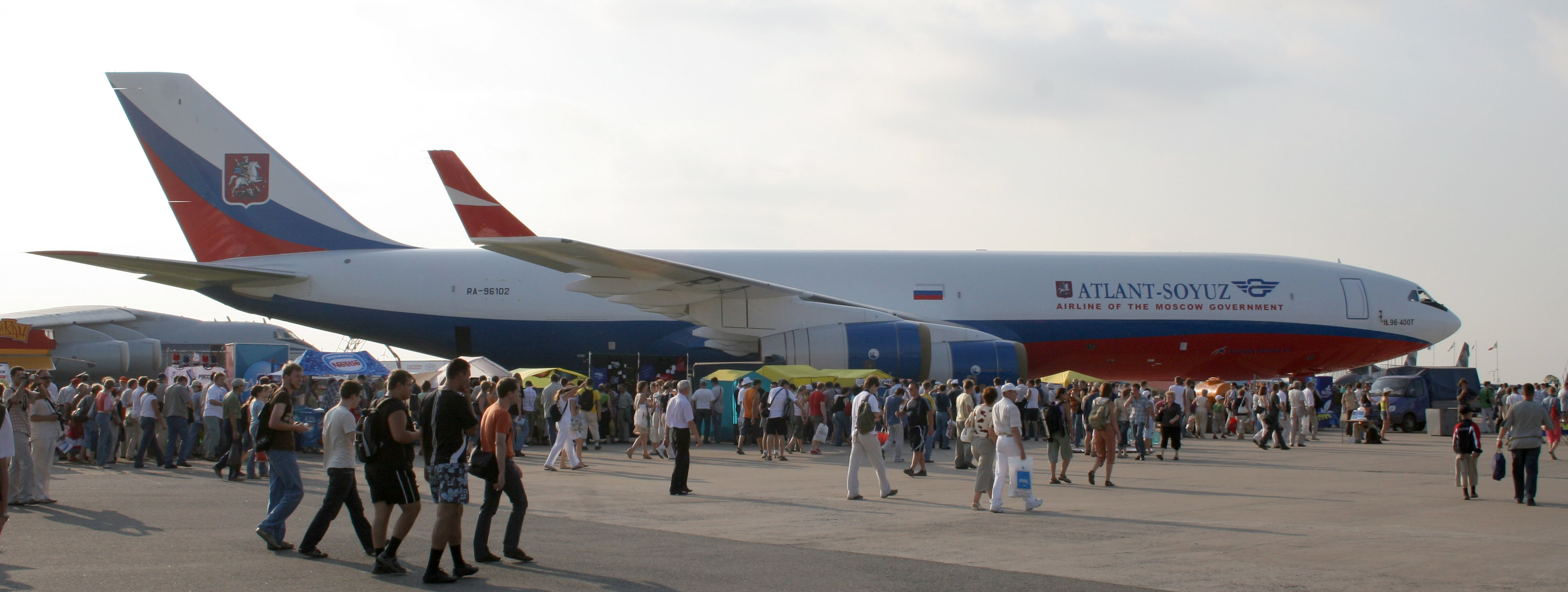 Самолёт Ил96-400. Экспозиция МАКС-2007